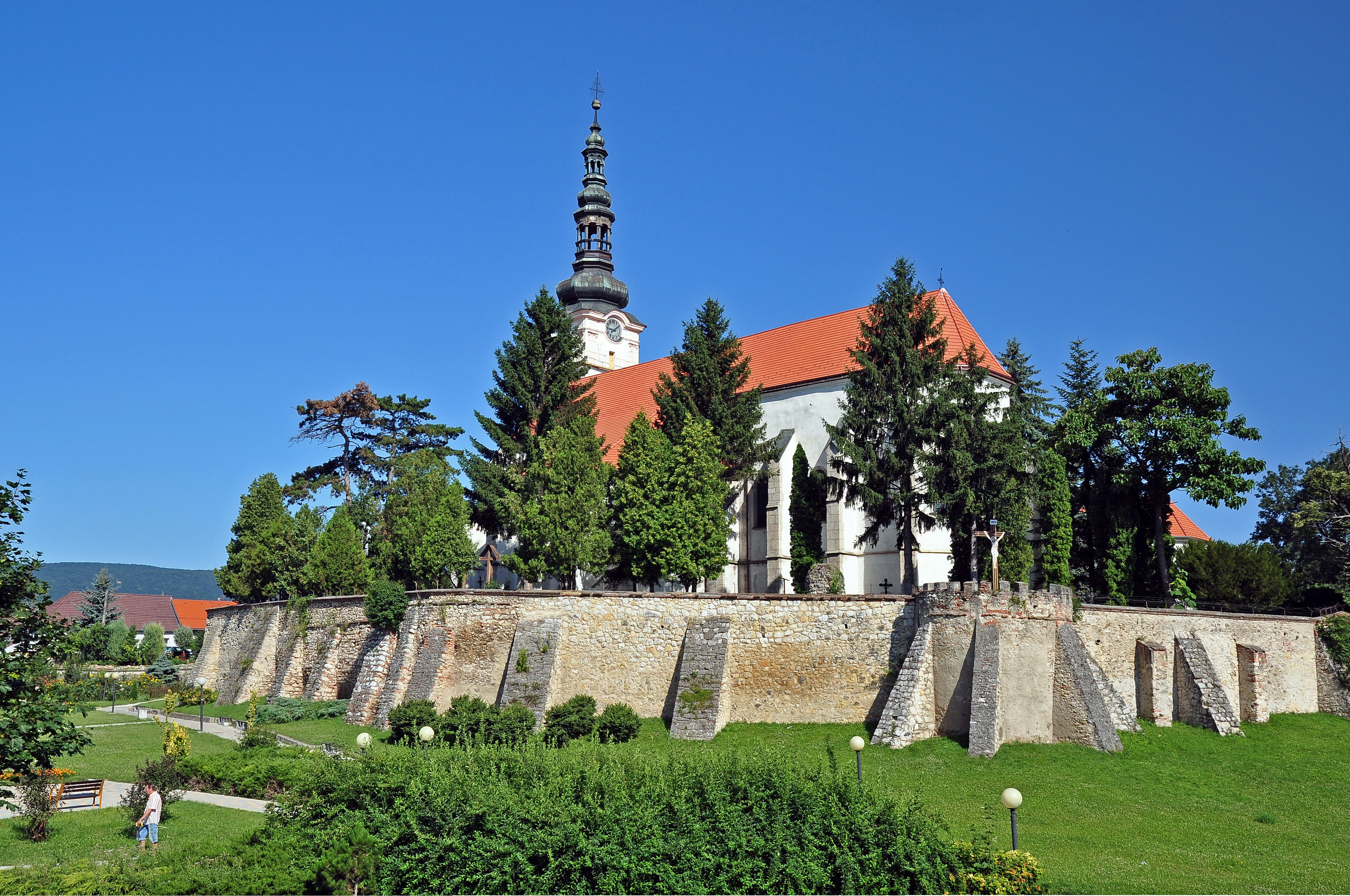 Farský kostol narodenia Panny Márie a opevnenie kostola, Nové Mesto nad Váhom, Slovensko